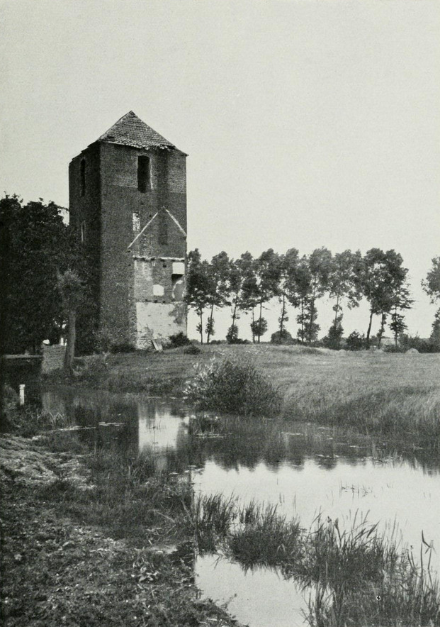 Die Turmruine des Hauses Langendonk in Geldern Aengenesch